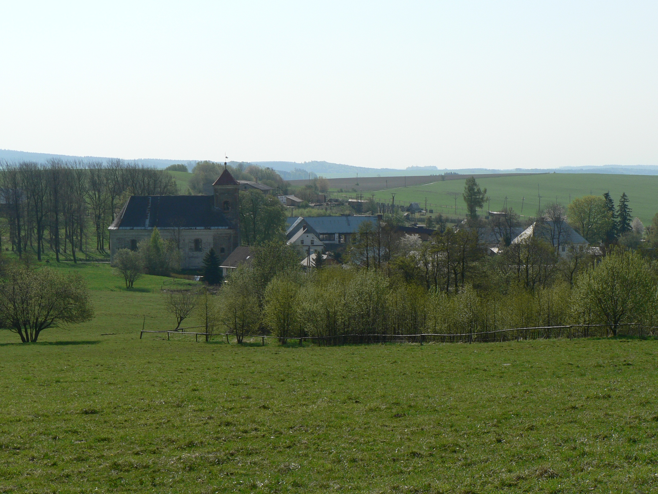 Pohled na Jiříkov od západu.